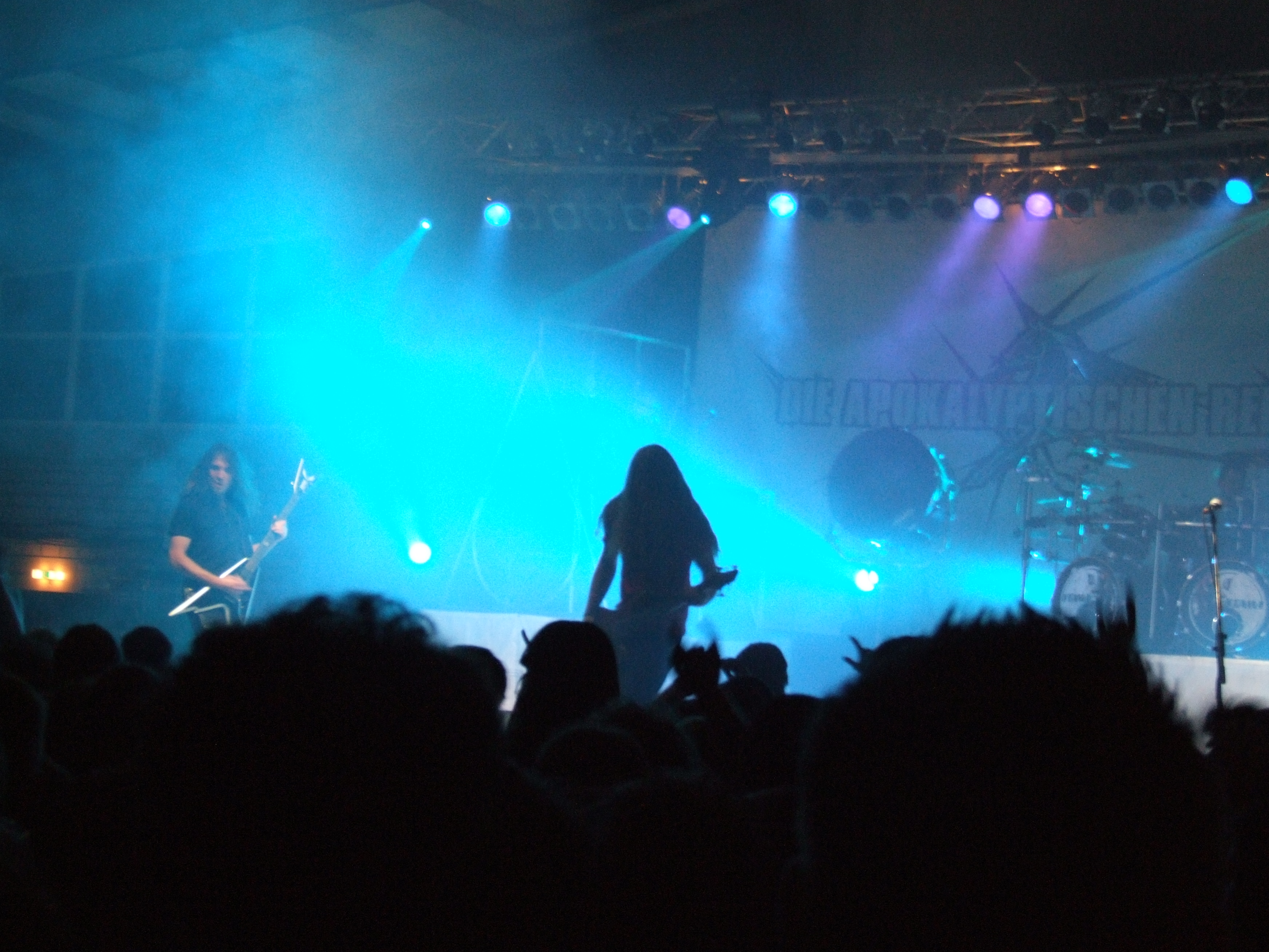 Ady (links), der Gitarrist, und Volk-Man (Volkmar Weber), Bassist, der Thüringer Metal-Band "Die Apokalyptischen Reiter, am 13. Juni 2009, Sommerfesthalle, Otterstadt, Deutschland